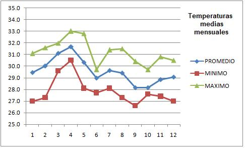 Gráfico de las temperaturas promedio mensual, el máximo mensual y mínimo mensual registrados en Nacaome, Valle, Honduras. Se basa en registros efectuados entre el 1972 y 1991, en el termómetro situado en NACAOME (COTA 35 msnm)